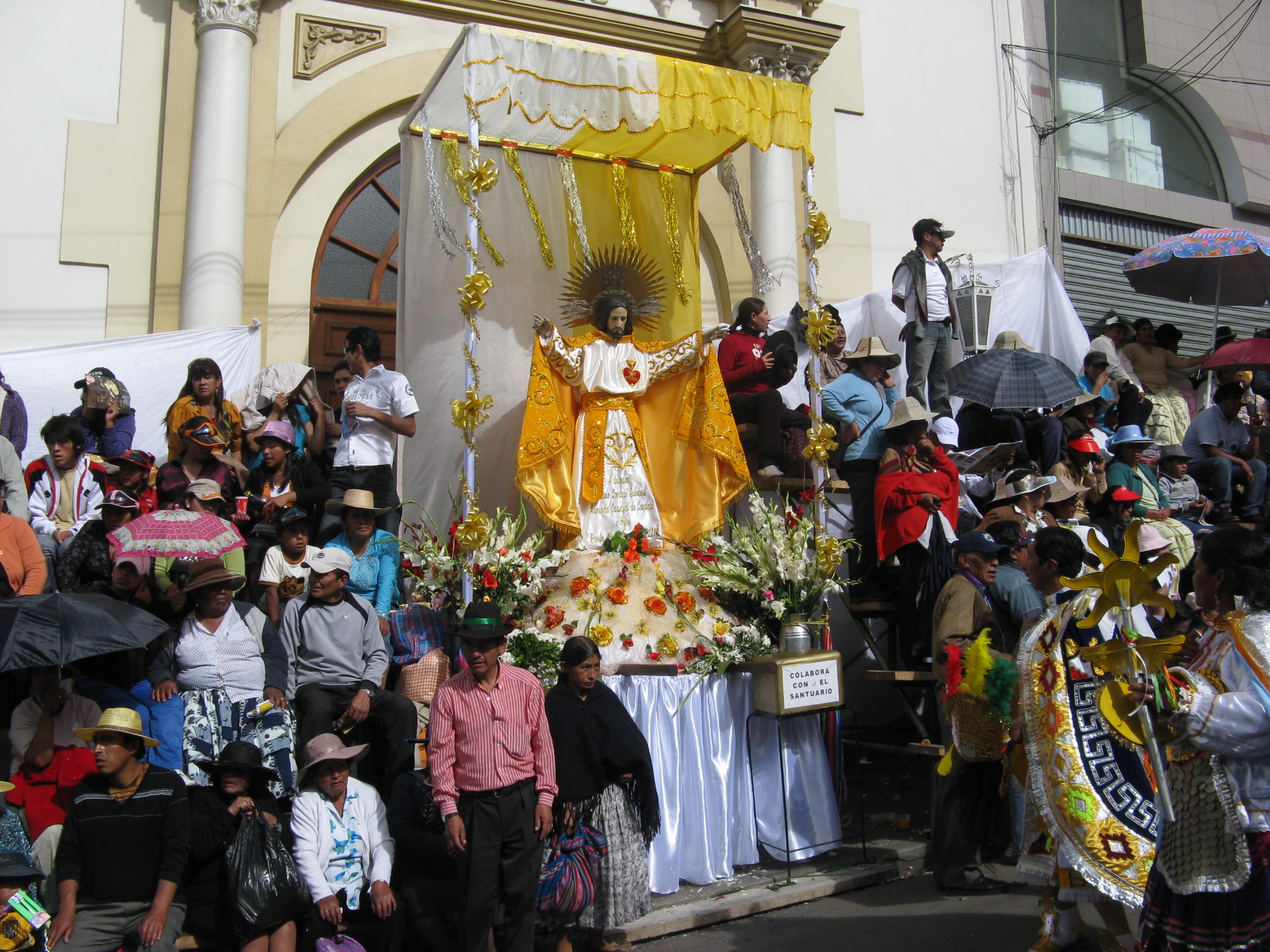 Imagen del Jesús de Gran Poder a la puerta de la iglesia del mismo nombre.